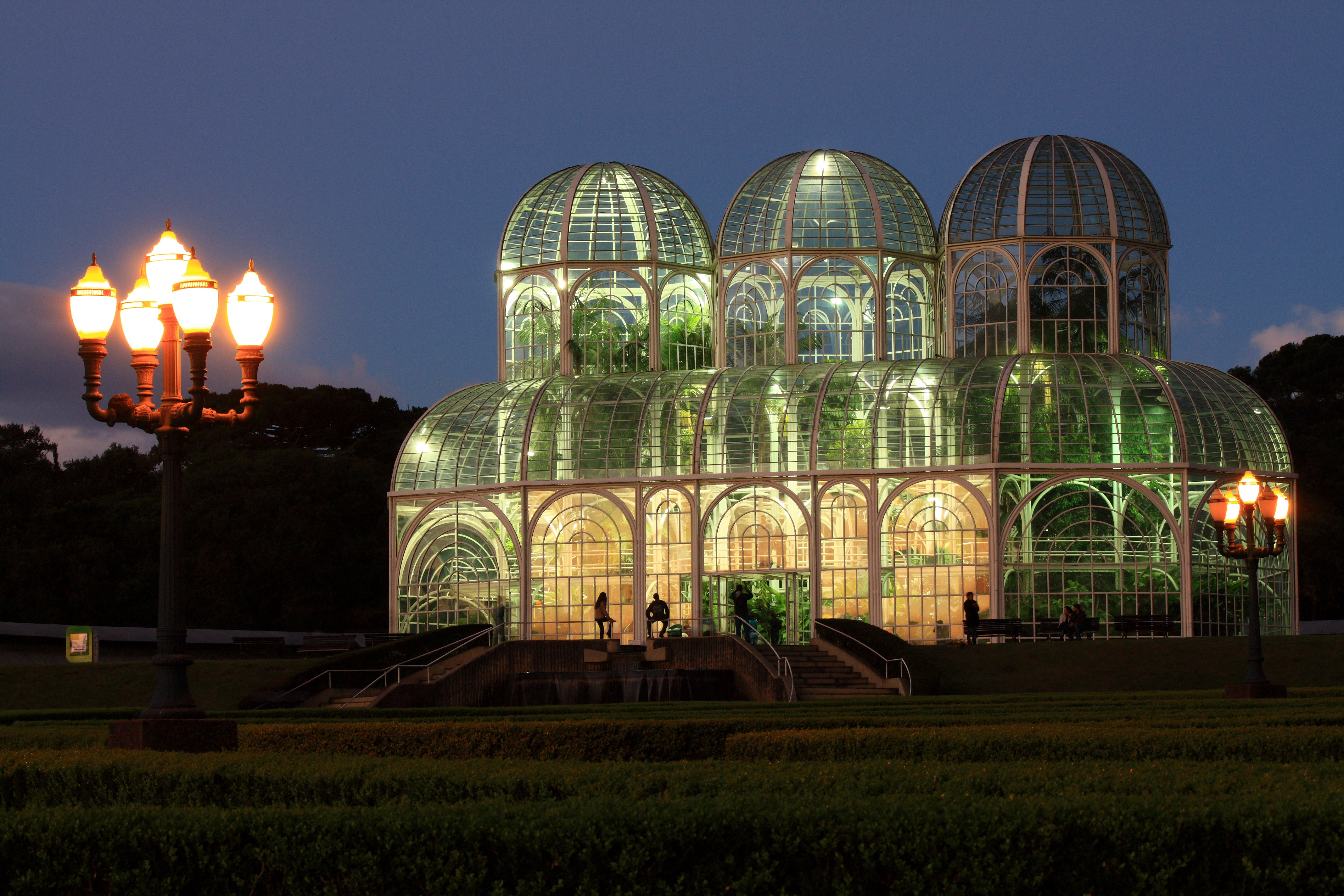 Veja em tamanho grande! Much better large!